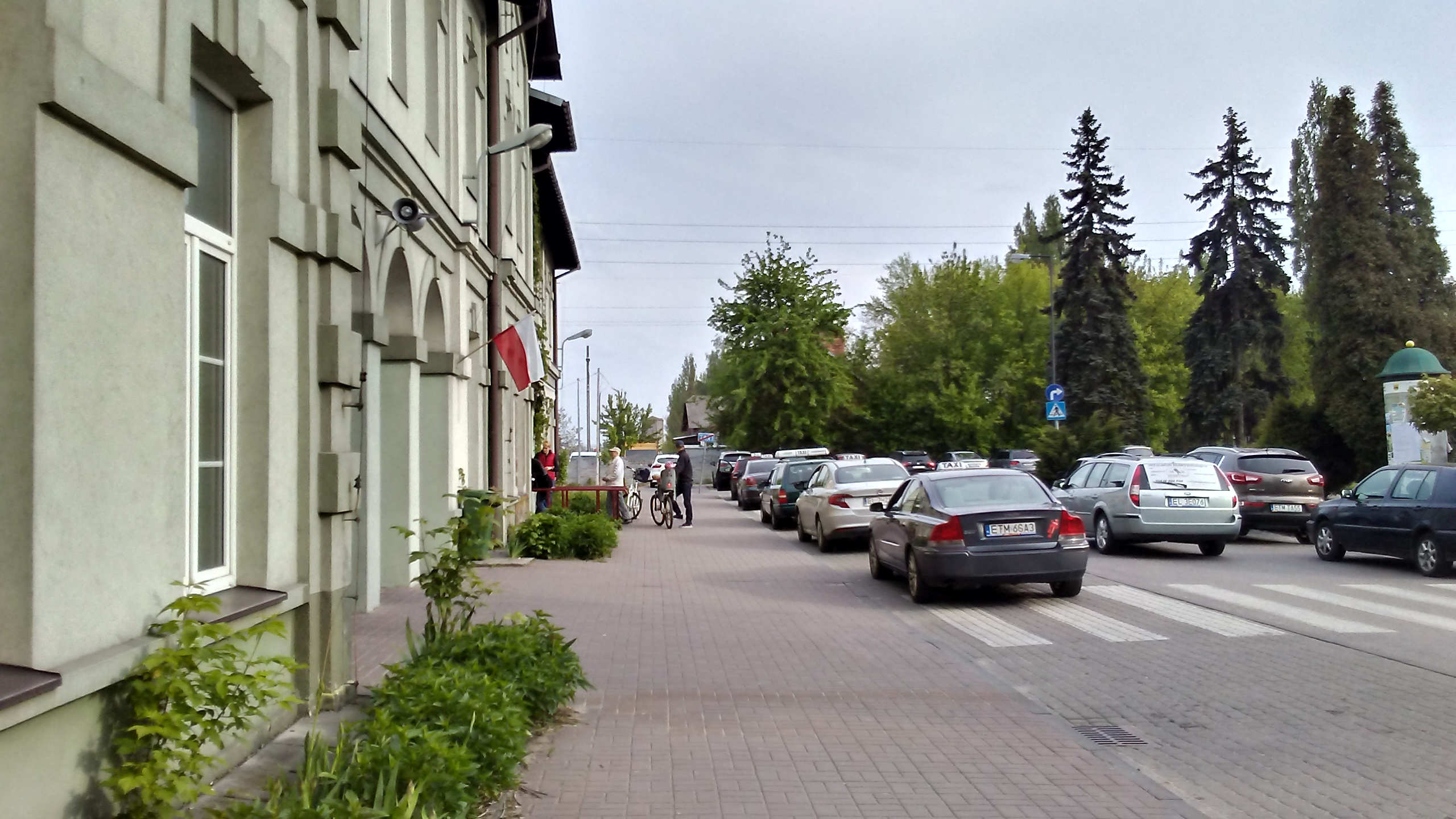 Tomaszów Mazowiecki - Postój taksówek przed stacją kolejową.